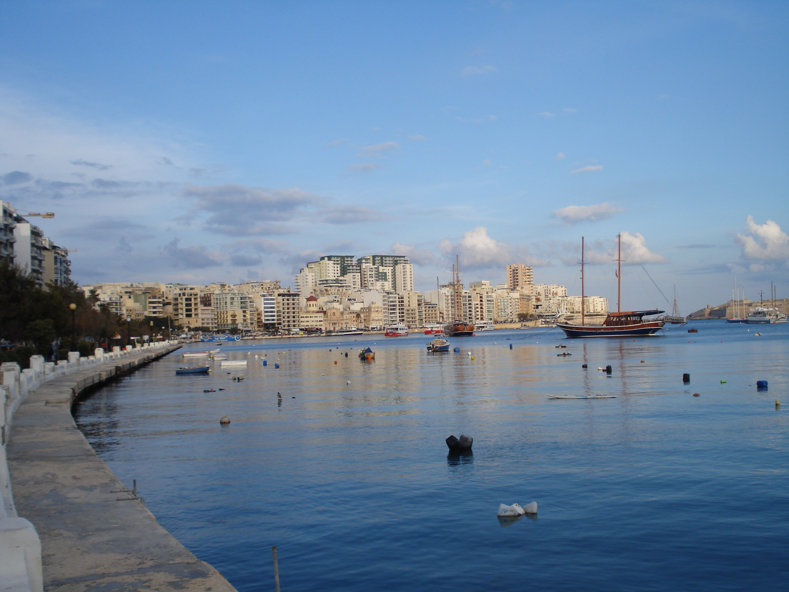 Sliema Creek